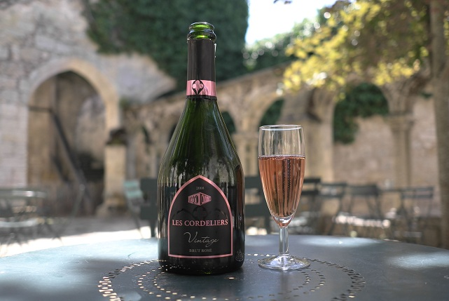 bouteille de crémant de bordeaux